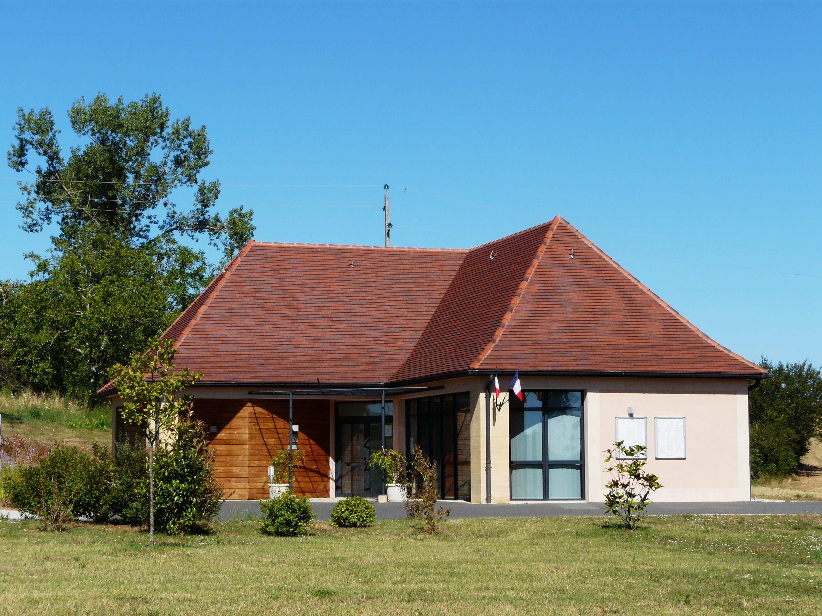 La mairie de Simeyrols, Dordogne, France.